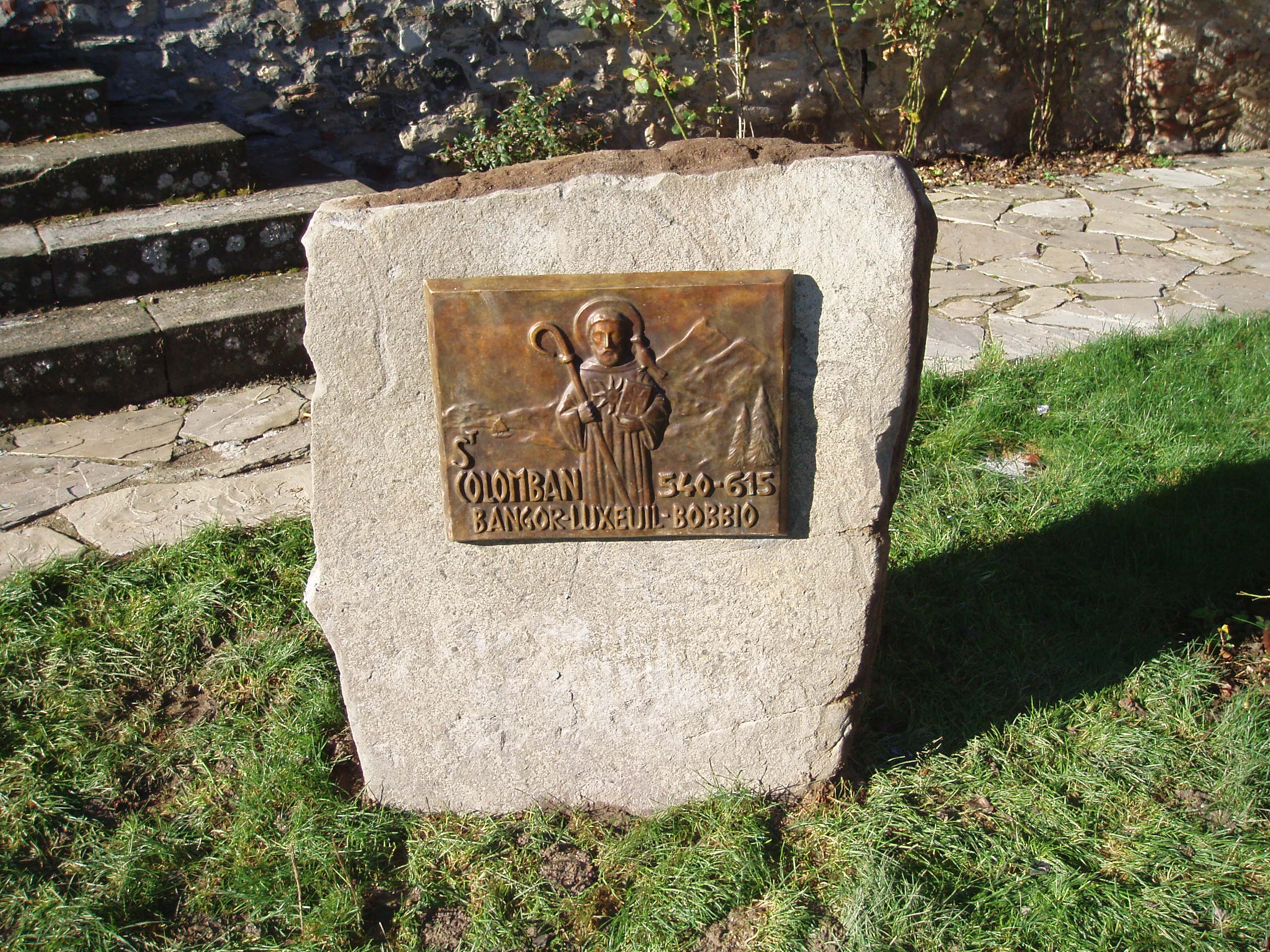 opera propria, foto digitale, Immagine della Targa di San Colombano in bronzo fusa in 5 esemplari collocati a Bangor in Irlanda del Nord (dove il santo patrono partì con 12 monaci) S. Coulomb in Bretagna (sbarco in Francia di Colombano) Luxeuill Septimer Pass (o Passo del Settimo, luogo nelle Alpi ove il santo passò dalla Svizzera in Italia) e l'ultimo a Bobbio (dove riposa), licenza libera